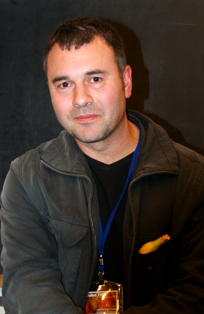 Richard Morgan u Zagrebu na SFeraKonu